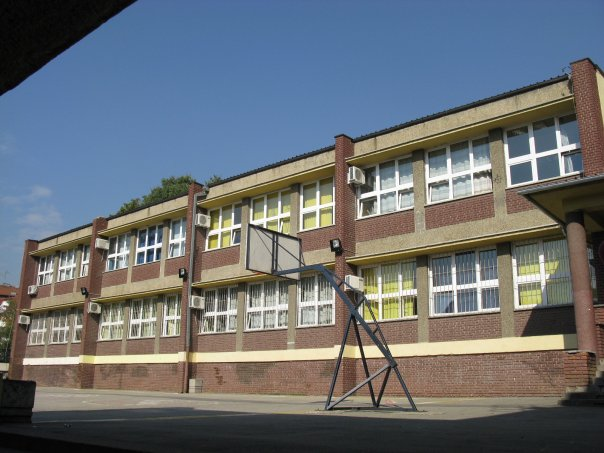 Основна школа „Светозар Марковић“ на Врачару